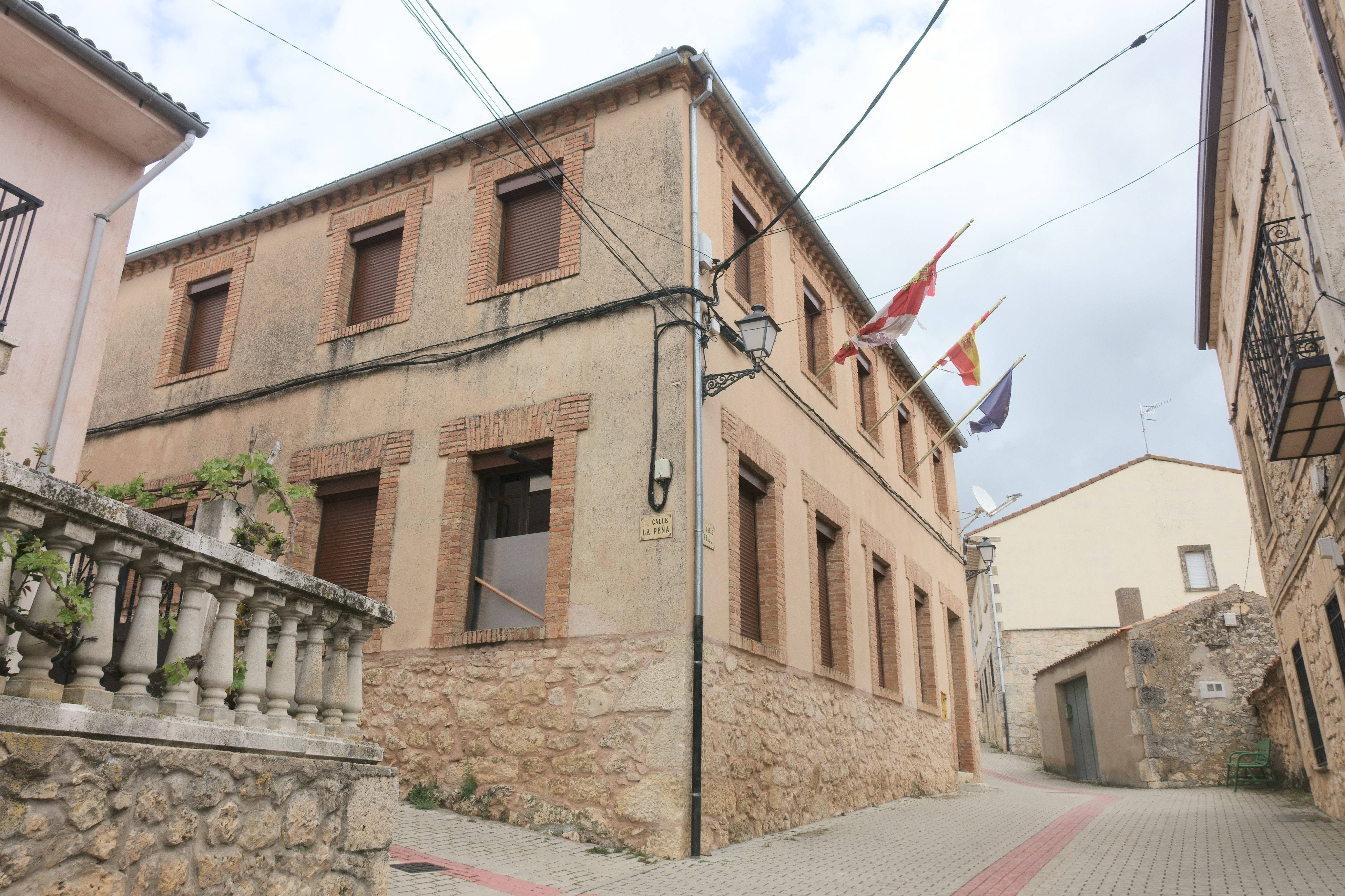 Casa consistorial de Castrojimeno (Segovia, España).